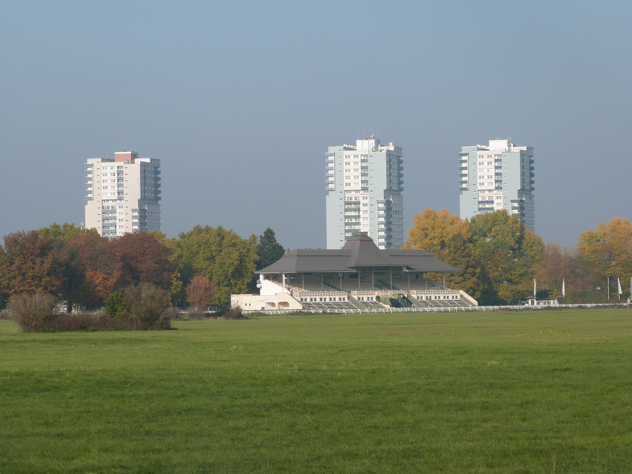 Galopprennbahn in den Passendorfer Wiesen, Saaleaue, Halle (Saale)